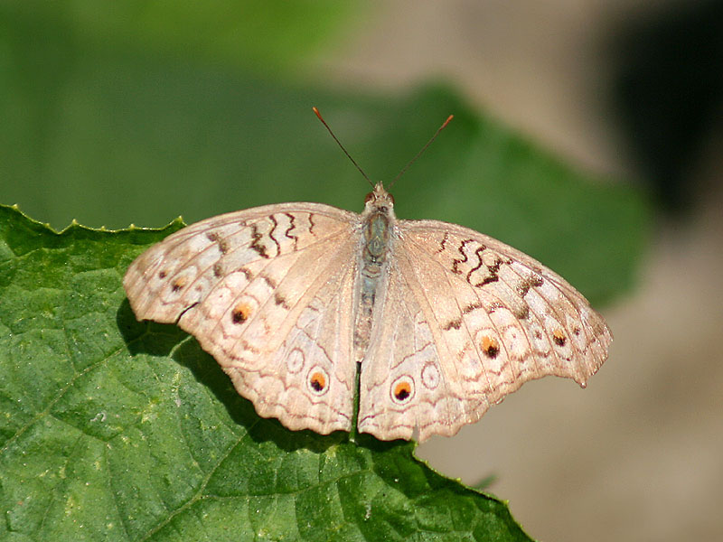 Grey Pansy Junonia atlites in Kolkata, West Bengal, India.